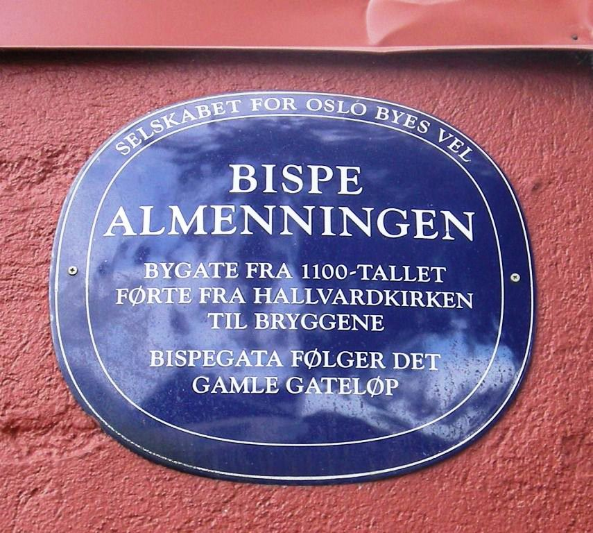 Bispealmenningen: Minne om gammelt gatenavn i Gamlebyen i Oslo